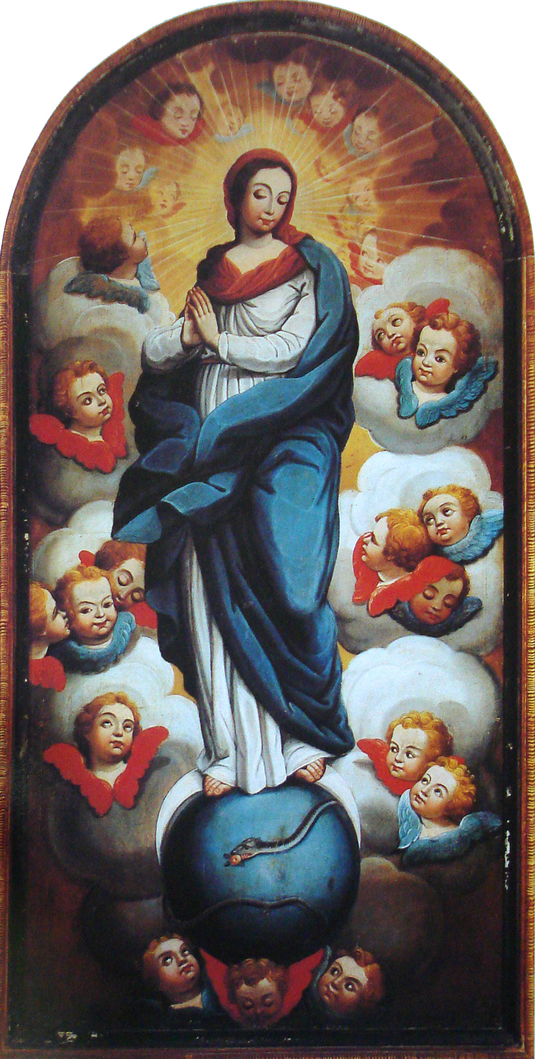 João Nepomuceno Correia e Castro (atribuição) - Imaculada Conceição. Óleo sobre tela, século XVIII. Proveniente do Museu Arquidiocesano de Mariana. 216 x 112,7 cm. Acervo do Museu da Inconfidência.